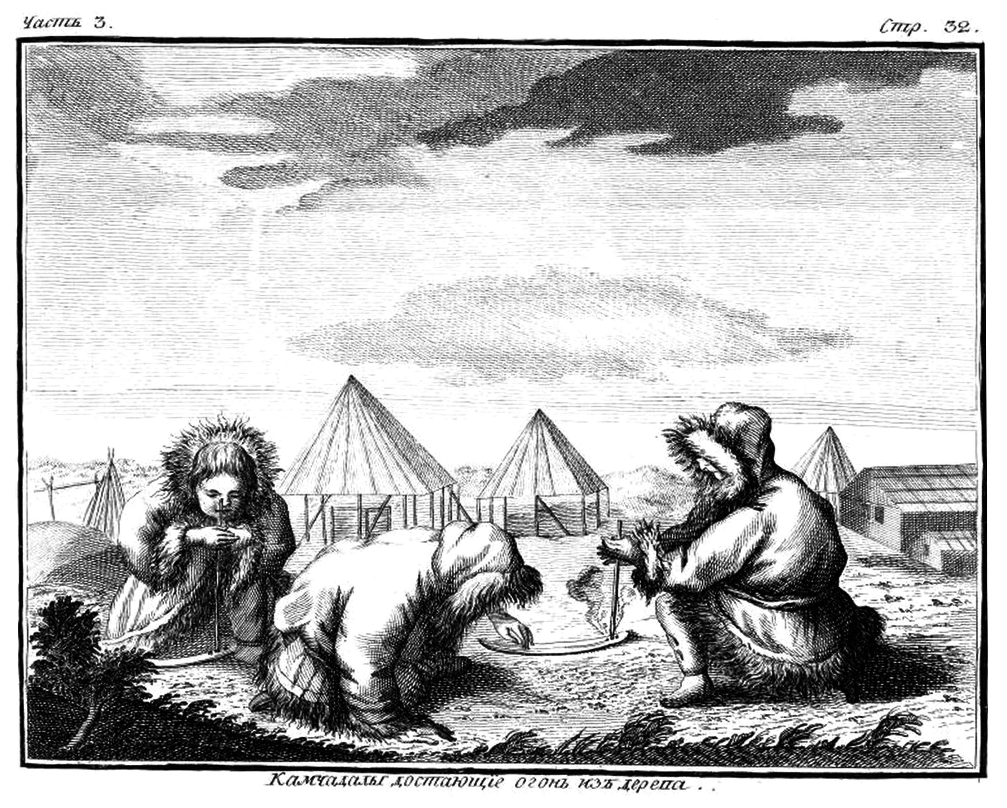 Illustration fra Stepan Krašenninikovs værk fra 1755 "Beskrivelse af landet Kamtjatka". Den første omfattende beskrivelse af halvøens urindbyggere